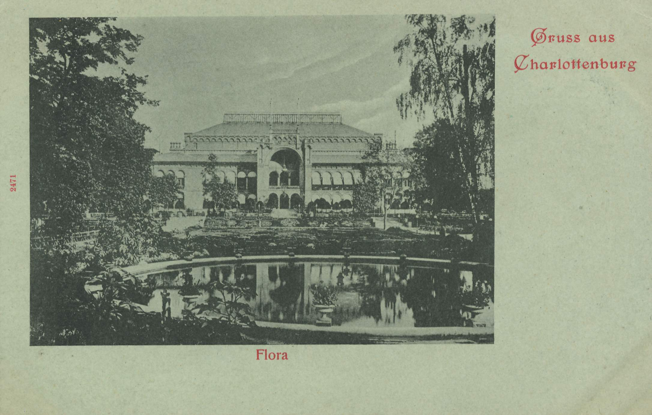 Der Vergnügungspalast Flora in Charlottenburg. Das Gebäude wurde 1874 errichtet. Es befand sich auf dem Gelände zwischen Charlottenburger Ufer, Brauhofstraße und Otto-Suhr-Allee und wurde 1904 gesprengt.